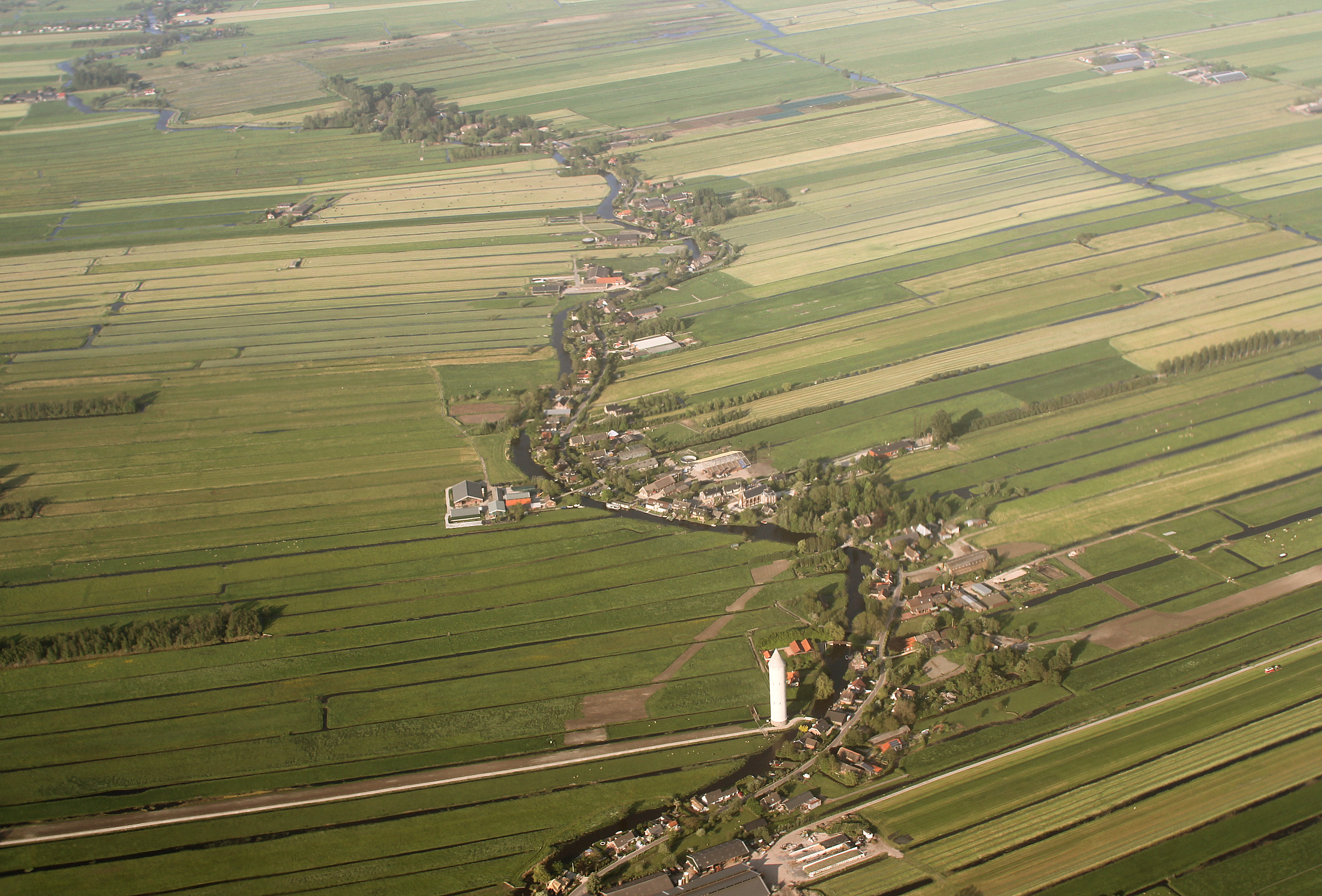 Het dorpje De Meije op de grens van Utrecht en Zuid-Holland